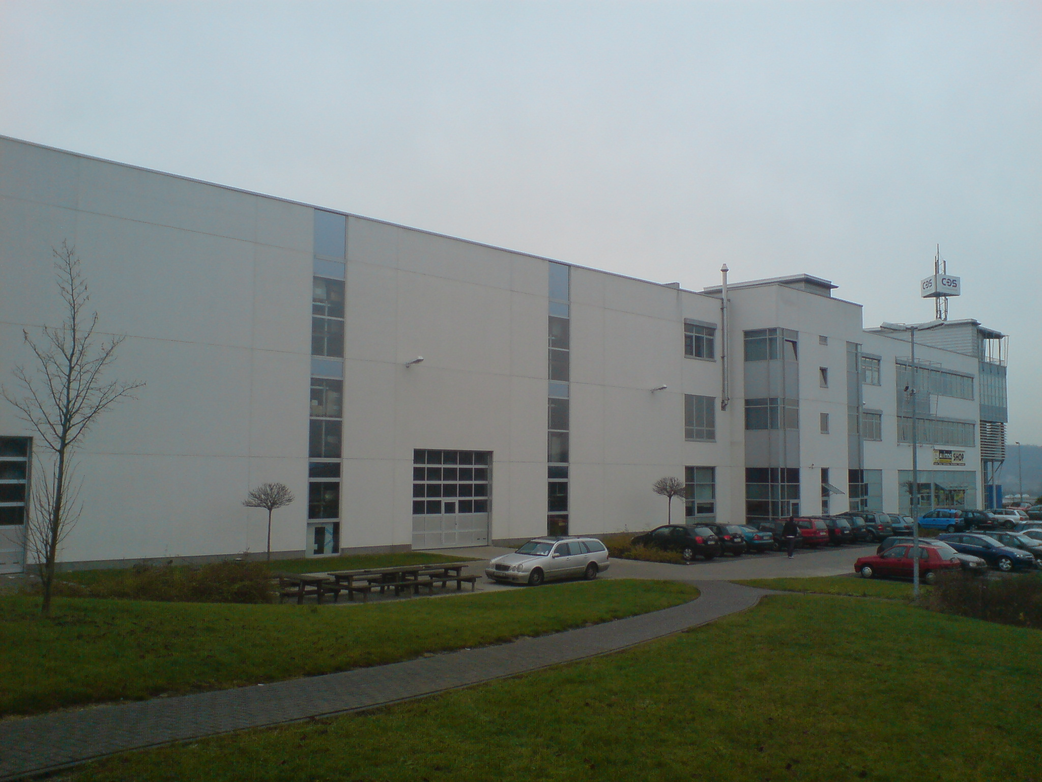 Hauptgebäude der COS